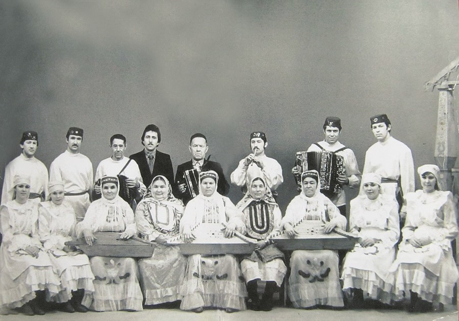 Татарча/tatarça: Tatar gösläçeläre, Yuğarı Subaş awılı, 1987